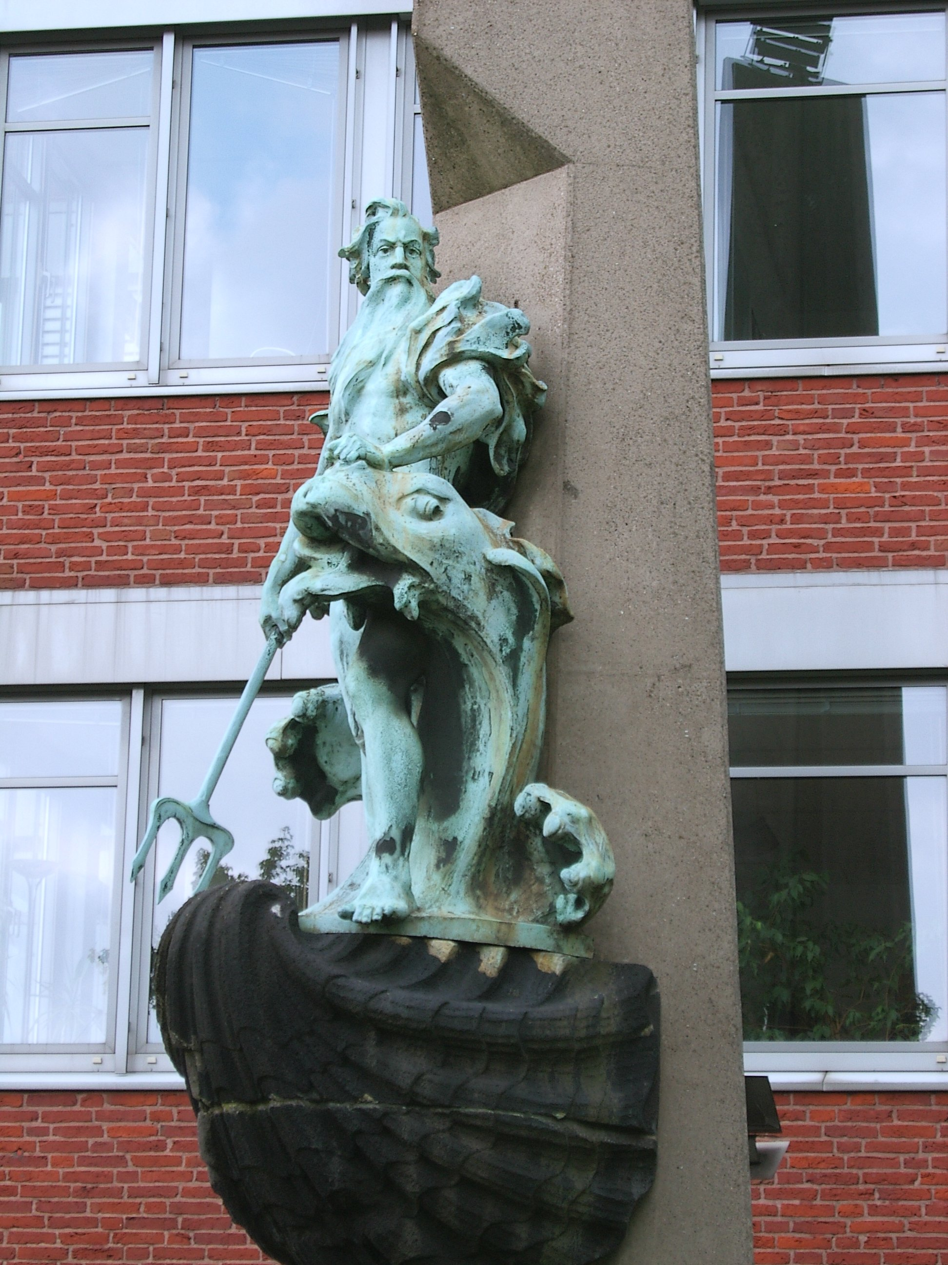 Neptunfigur bei der Hohen Brücke in Hamburg-Altstadt. Wahrscheinlich ursprünglich an der Fassade des Neptun-Hauses (Hohe Brücke 1).